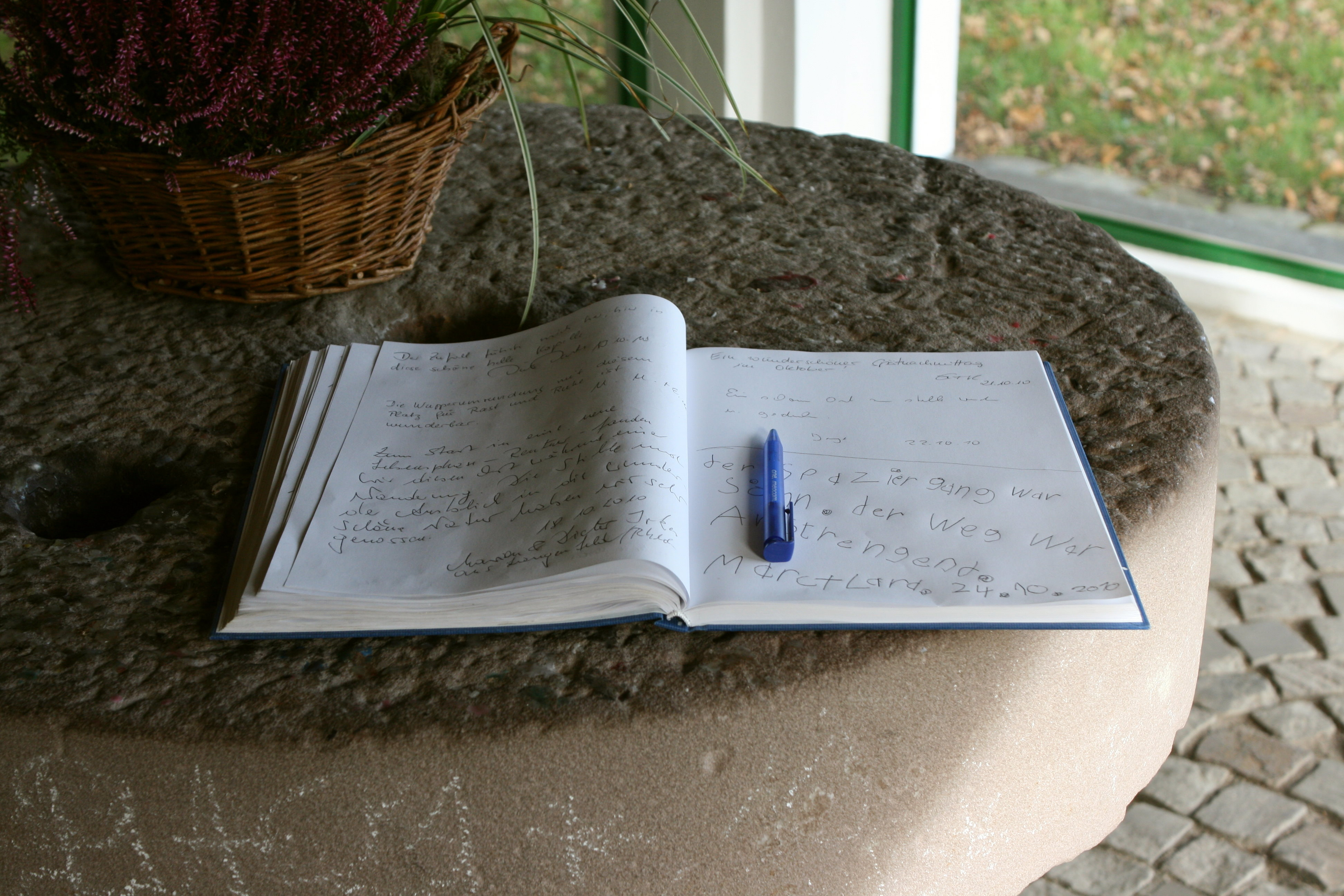 Friedenskapelle in Hückeswagen-Voßhagen